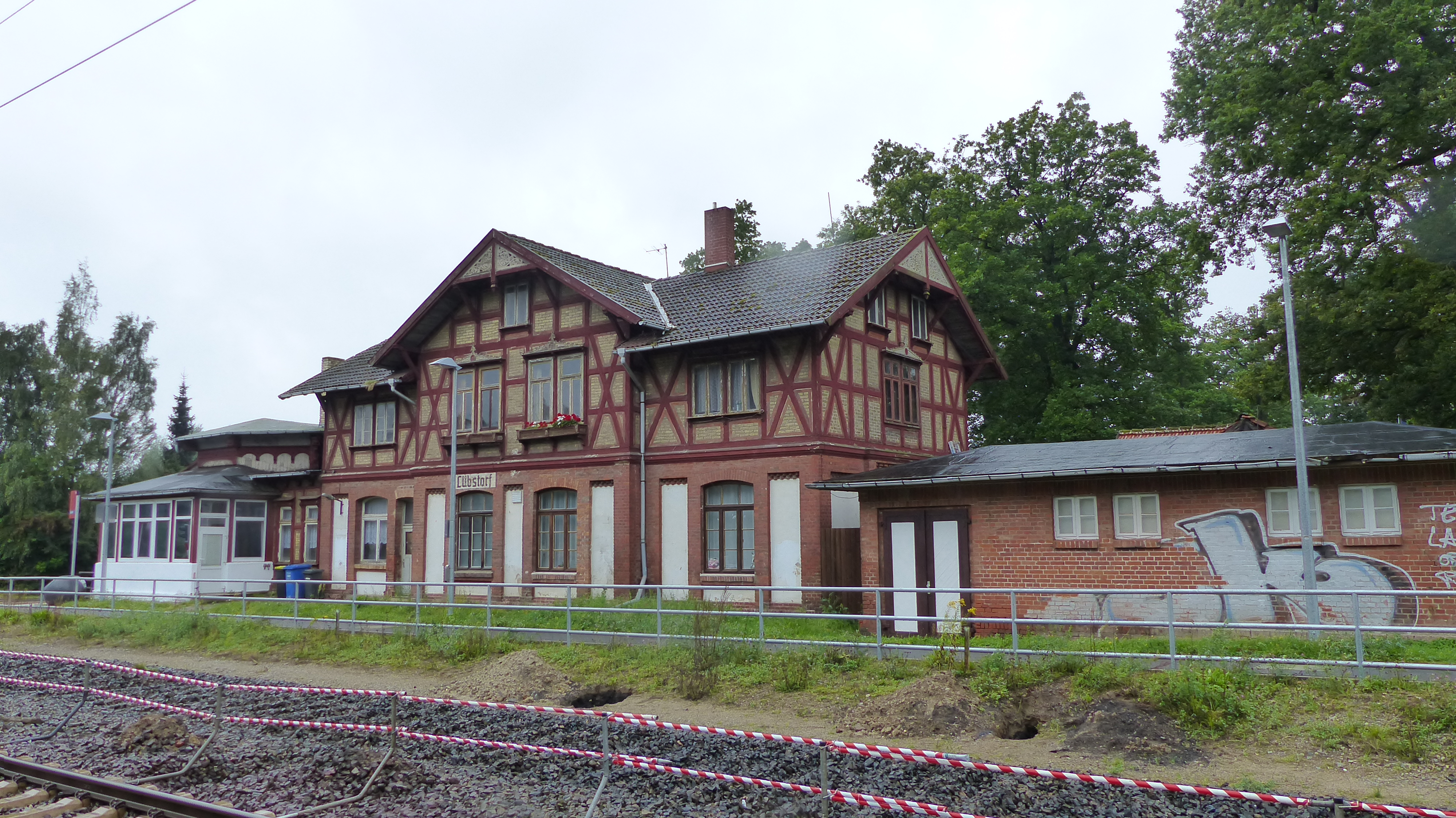 Altes Fachwerkhaus am Bahnübergang des Bahnhofs Lübstorf, Bahnhofstraße 20